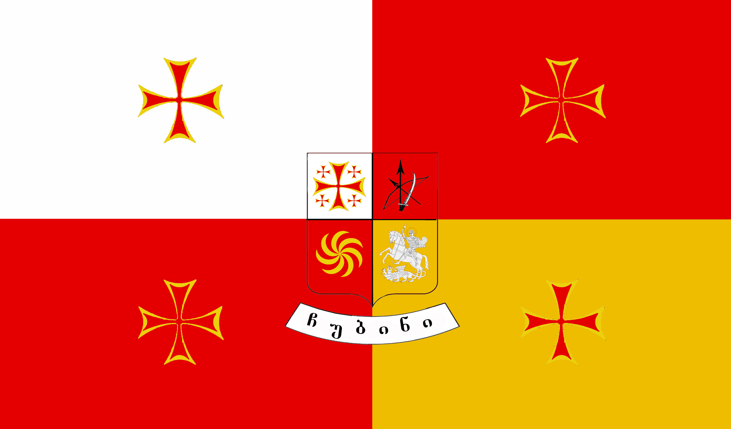 ჩუბინიძეების, ჩუბინიშვილების, ჩუბინაშვილების საგვარეულო დროშა